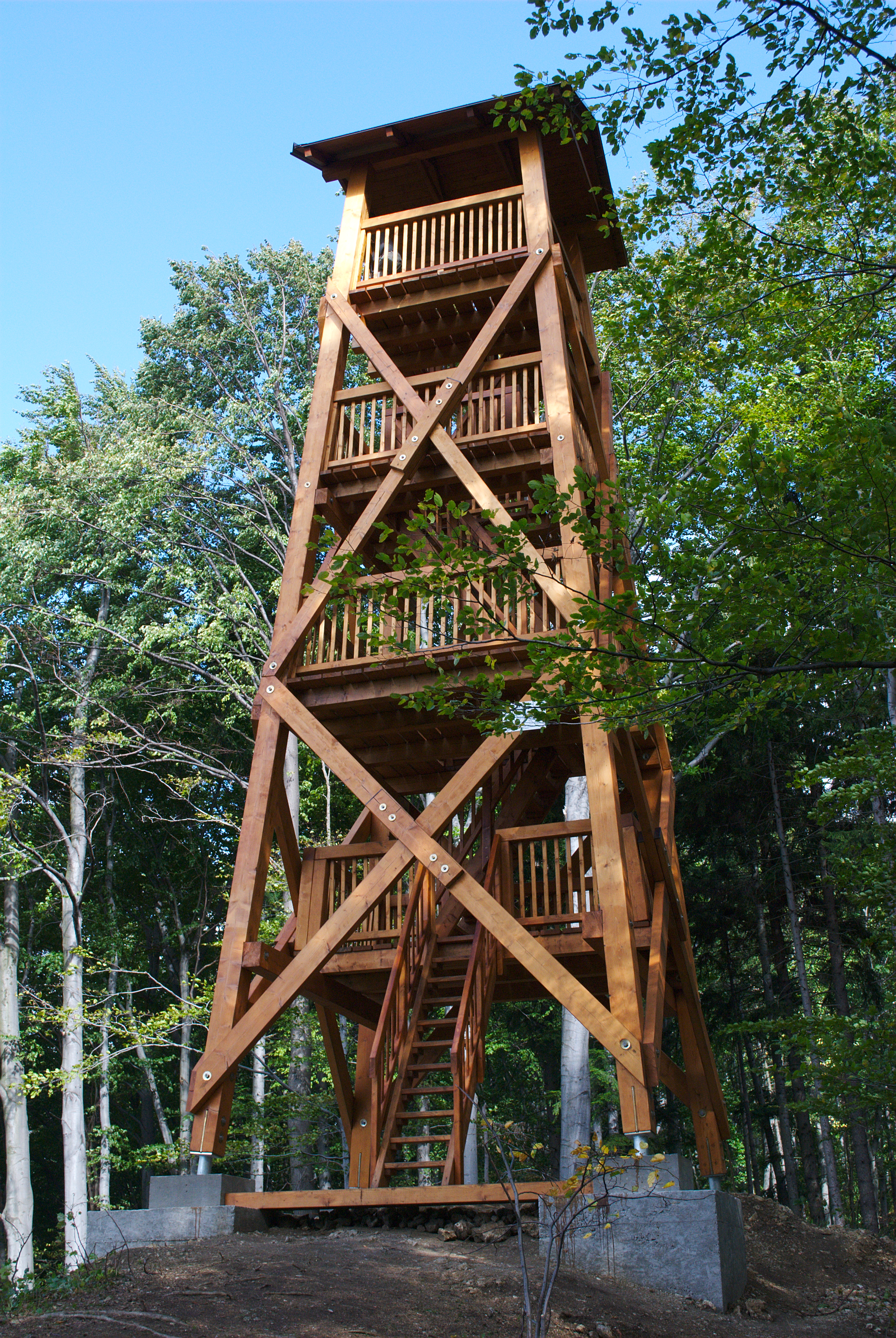 Pomník Petra Bezruče (Kopřivnice), hrana kopce nad Kopřivnicí, tzv. Bezručova vyhlídka, Kopřivnice